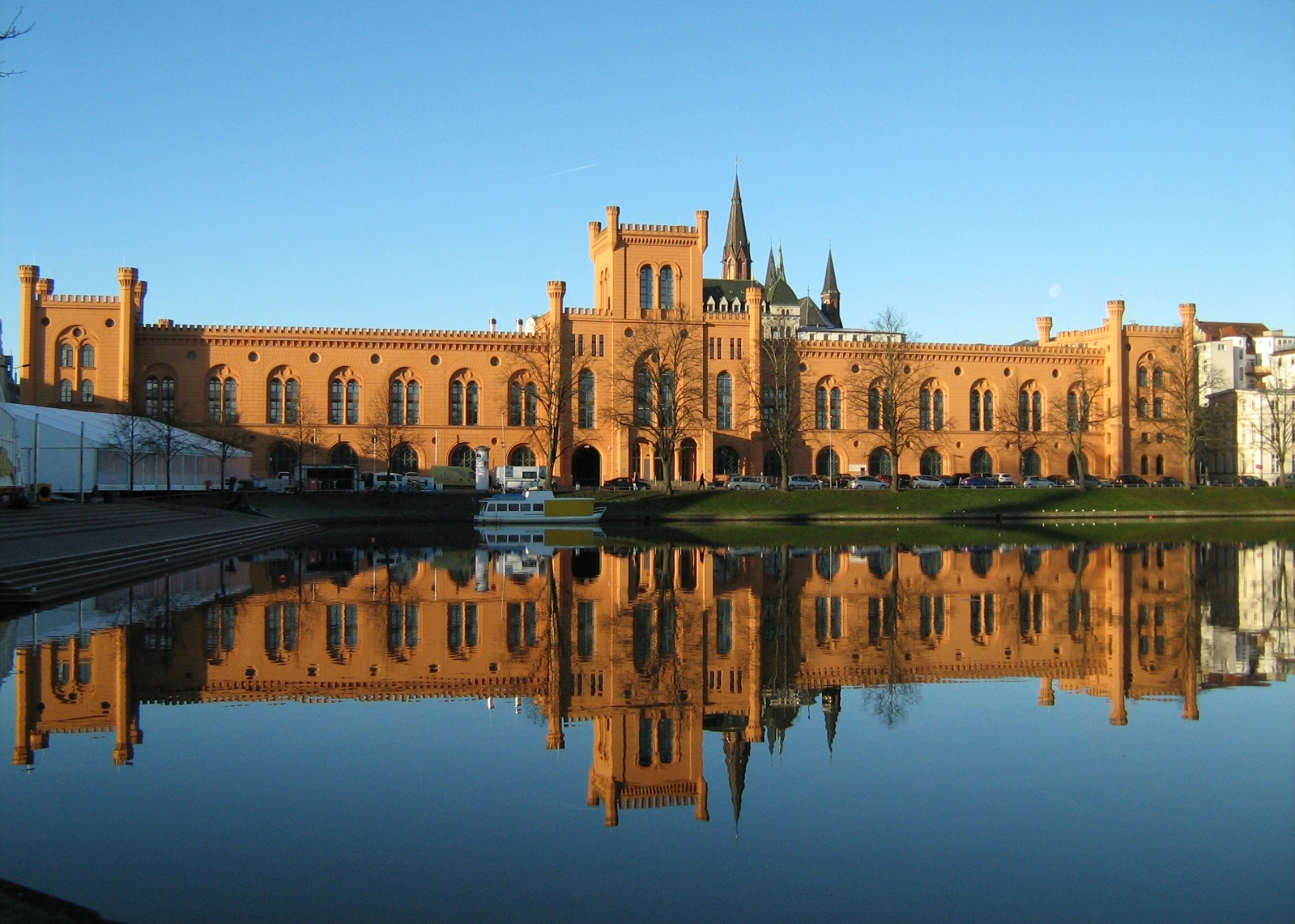 Arsenal am Pfaffenteich, Schwerin, Mecklenburg-Vorpommern, Deutschland